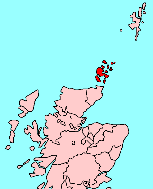 Orkney